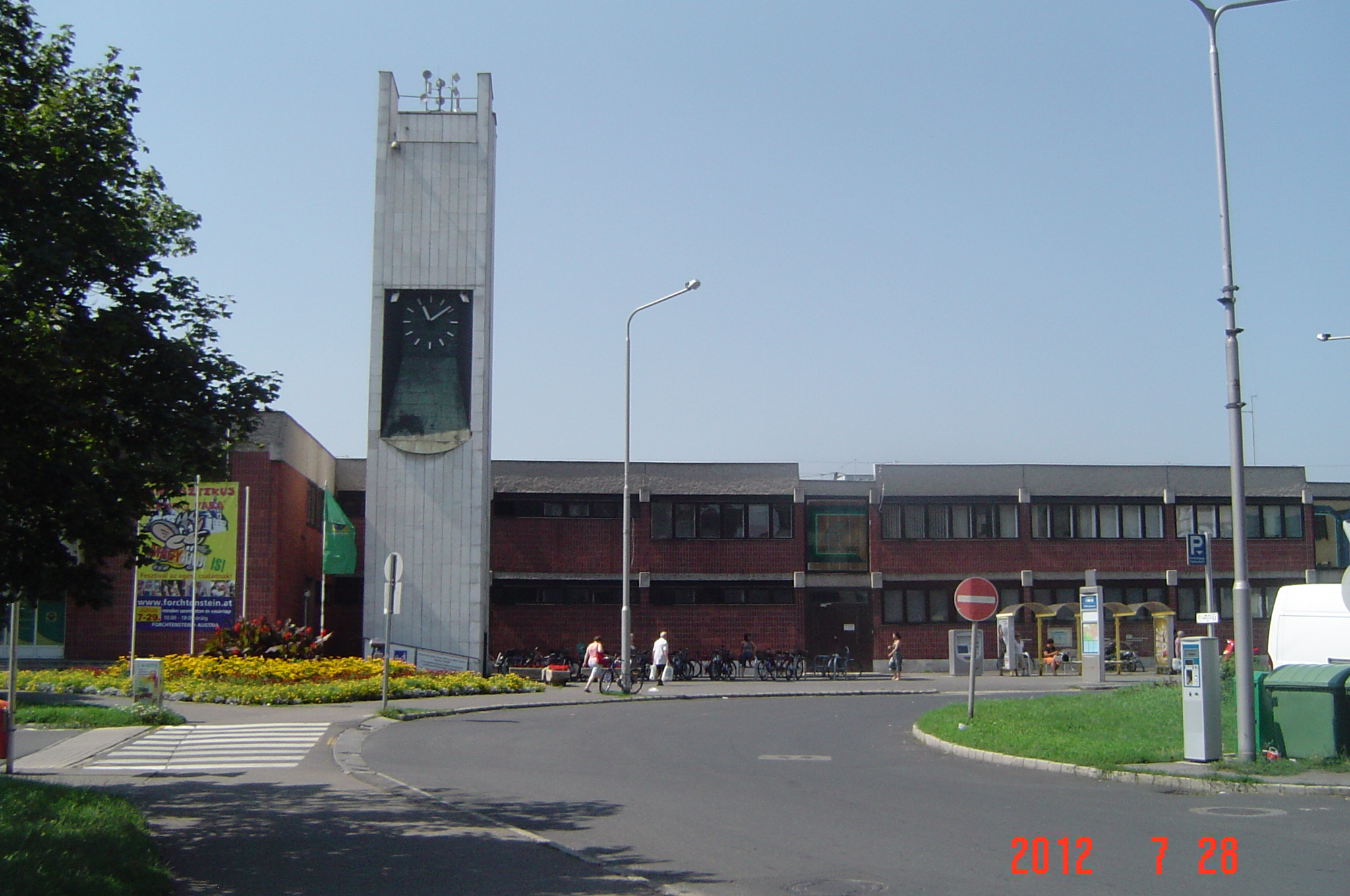 A soproni GYSEV pályaudvar állomásépülete.